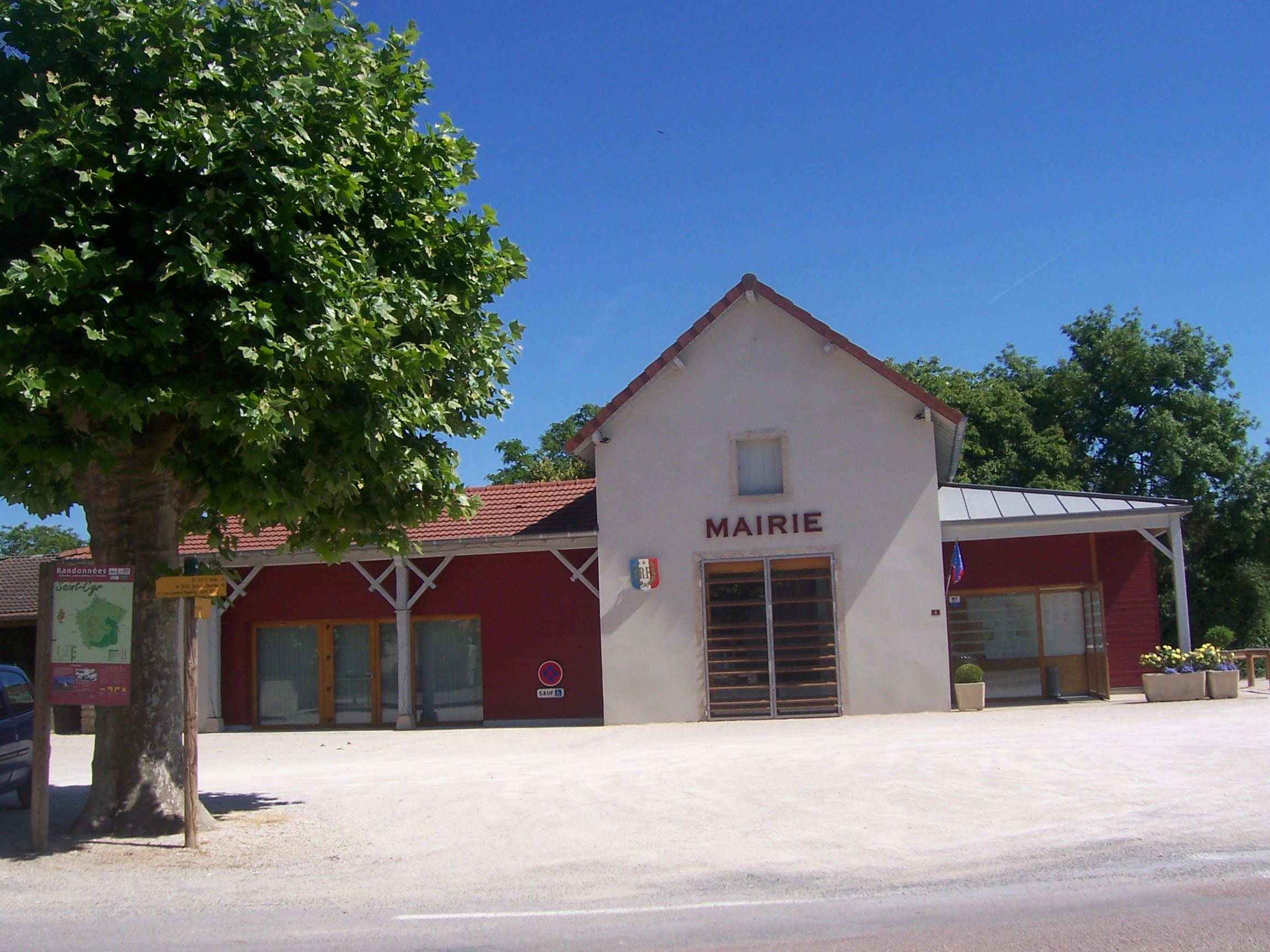 Mairie de Saint-Cyr